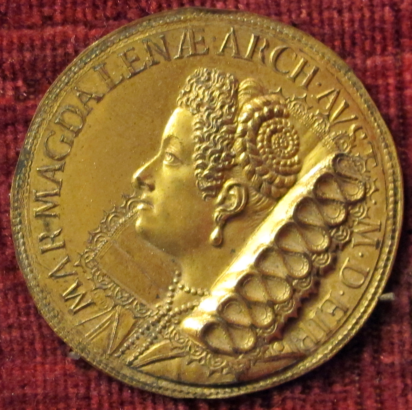 Medaglia di Maria Maddalena d'Austria (oro), 1618